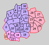 真壁郡の町村